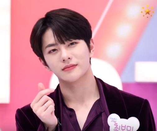 9일 오후 서울 마포구 상암동 tbs 오픈스튜디오에서 공개녹화로 ‘tbs 팩트인스타 – 골든차일드편’이 녹화가 진행됐다.